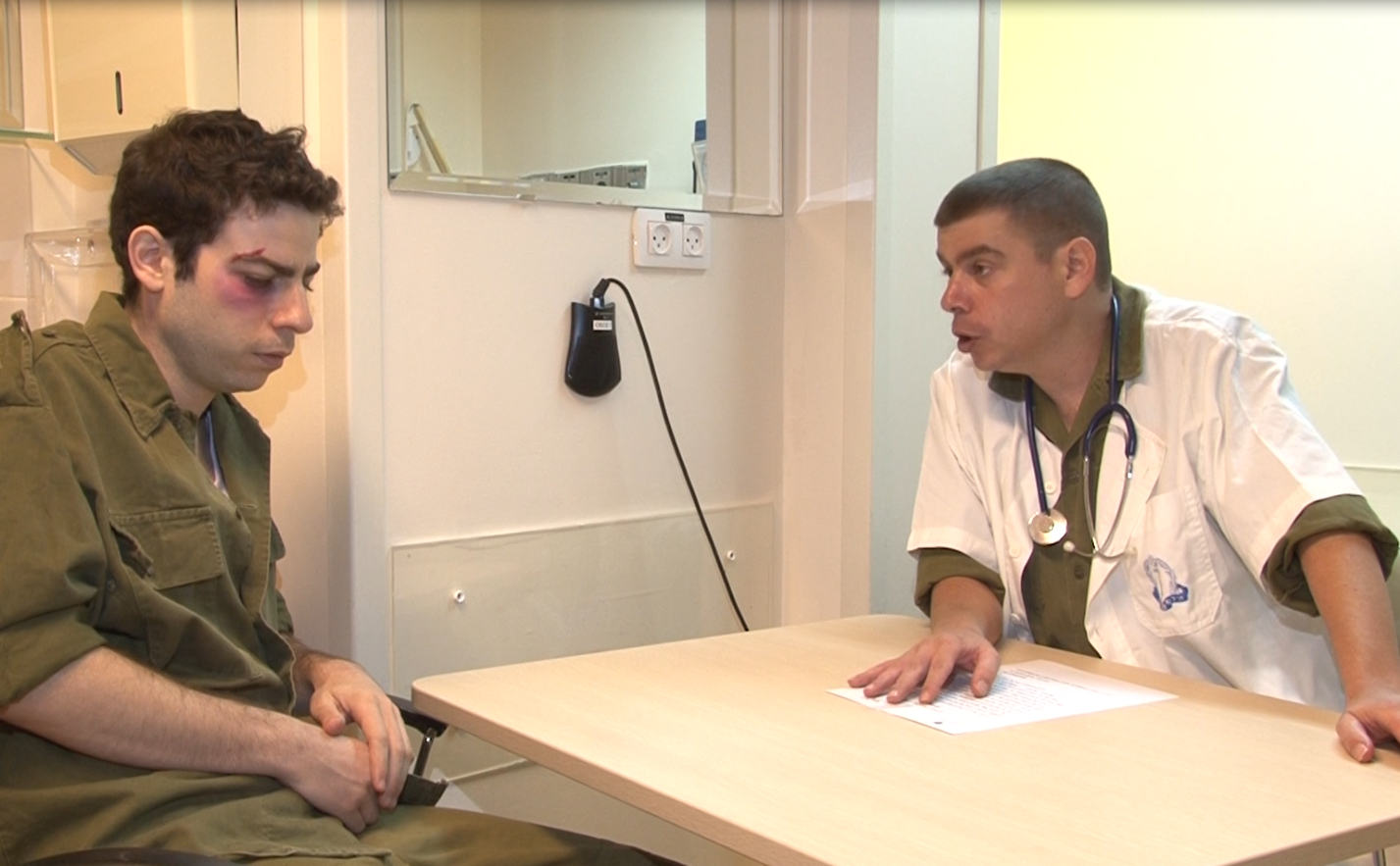 תמונה מתוך סדנה במיומנויות תקשורת עבור רופאים צבאיים מציגה תרחיש בנושא אלימות